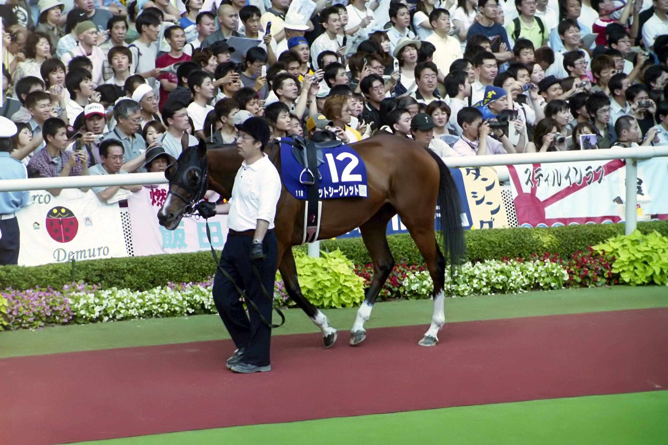 ホットシークレット号